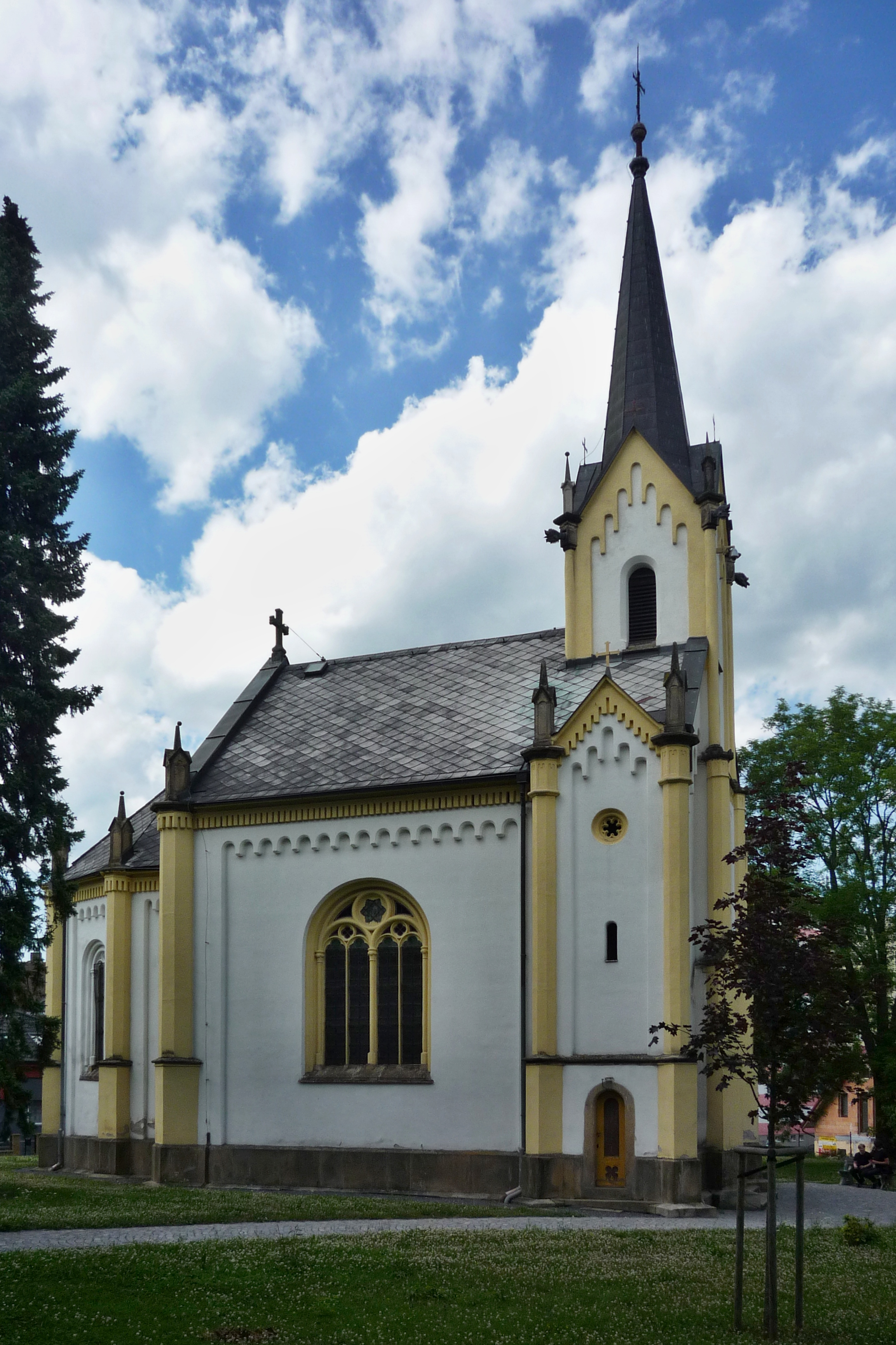 Kaple Povýšení svatého Kříže. Hřbitovní kaple postavena 1863. Architekt František Schmoranz starší. Ulice Na Chmelnici. Město Chotěboř. Okr. Havlíčkův Brod. Kraj Vysočina. Czech Republik.